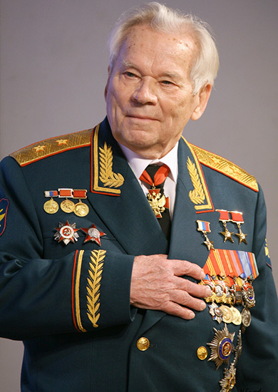 Михаил Тимофеевич Калашников (1919 — 2013) — советский и российский конструктор стрелкового оружия, генерал-лейтенант